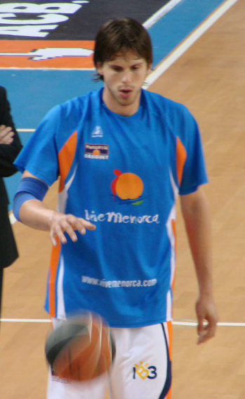 Mario Stojic-Menorca Basquet 06/07